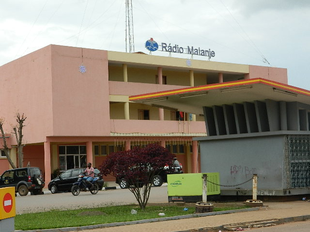 Rádo Malanje